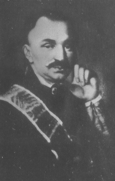 Stanisław Jelski (zm. 1829) - komisarz skarbowy, marszałek powiatu ihumeńskiego, porucznik w Brygadzie Petyhorskiej kawalerii narodowejБеларуская (тарашкевіца): Станіслаў Ельскі